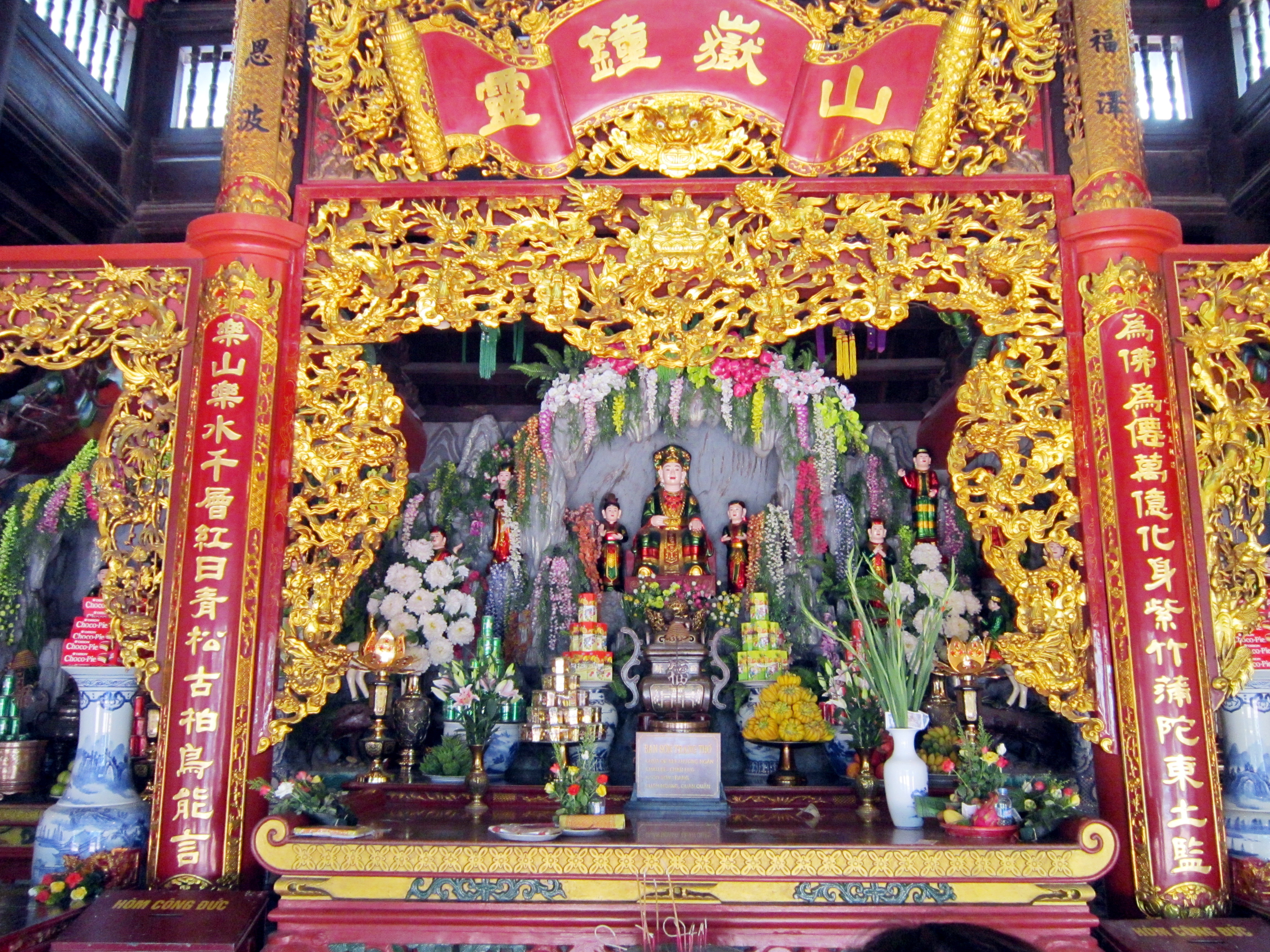 Điện thờ Liễu Hạnh Công chúa trong Phủ Tây Hồ (Hà Nội, Việt Nam). Đây là một nhân vật trong truyền thuyết, và là một trong bốn vị thánh bất tử trong tín ngưỡng của người Việt.